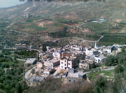 راجب